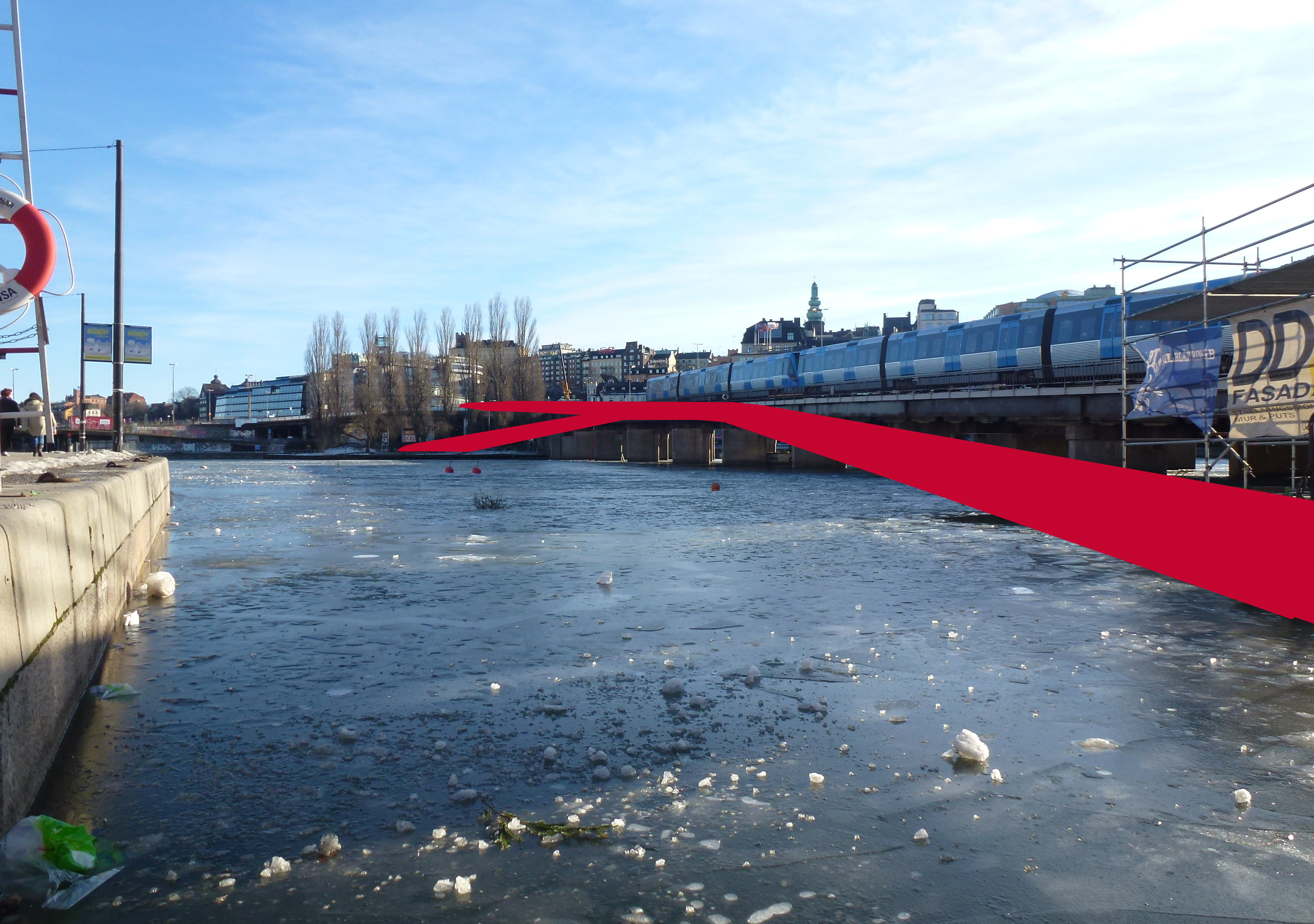 Nya Slussen, Söderström med ny gång- och cykelbro, vy mot syd